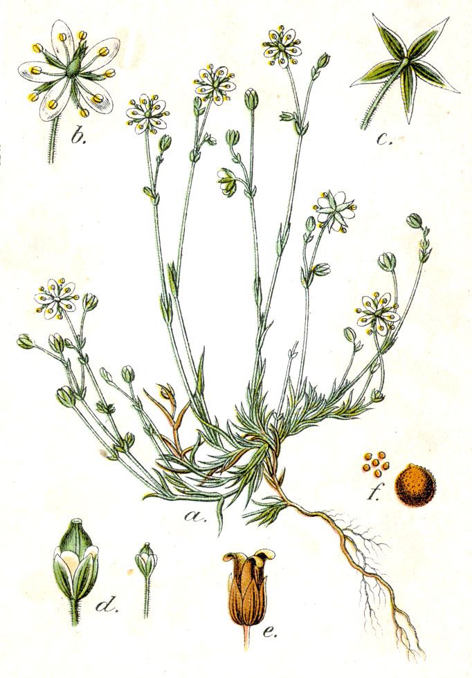 Frühlings-Miere, Minuartia verna subsp. verna, syn. Alsine verna (L.) Wahlenb. Original Caption Frühlings-Miere, Alsine verna